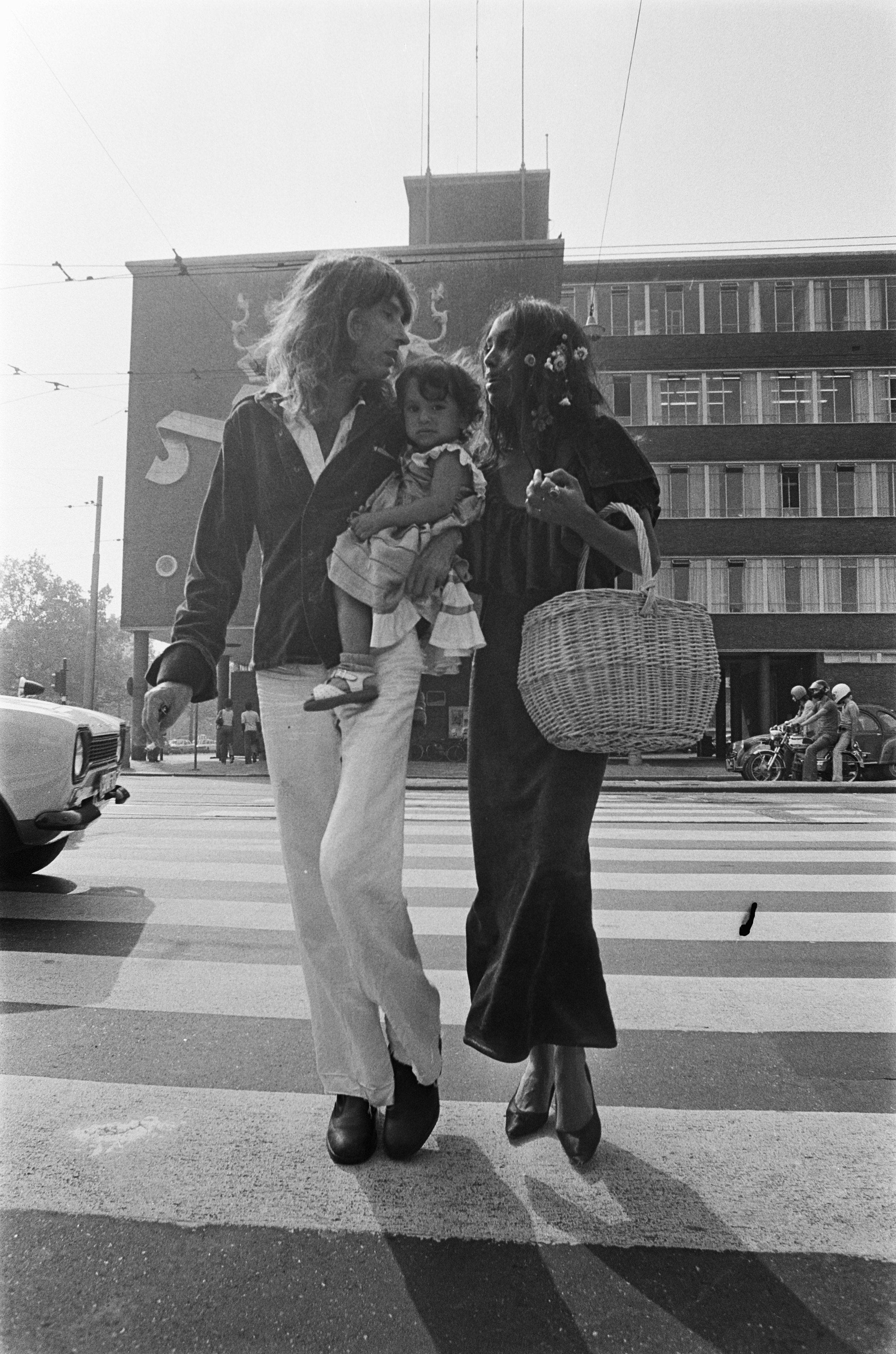 Collectie / Archief : Fotocollectie Anefo Reportage / Serie : Aad Veldhoen bij de politie te Amsterdam i.v.m. het verhoor over majesteitsschennis Beschrijving : Aad Veldhoen met echtgenote Kaboel en dochtertje voor het politiebureau Datum : 12 augustus 1975 Locatie : Amsterdam, Noord-Holland Trefwoorden : beeldend kunstenaars, gezinnen, politiebureau's, verhoren, zebrapaden Persoonsnaam : Veldhoen, Aad, Veldhoen, Kaboel Fotograaf : Fotograaf Onbekend / Anefo Auteursrechthebbende : Nationaal Archief Materiaalsoort : Negatief (zwart/wit) Nummer archiefinventaris : bekijk toegang 2.24.01.05 Bestanddeelnummer : 928-0949